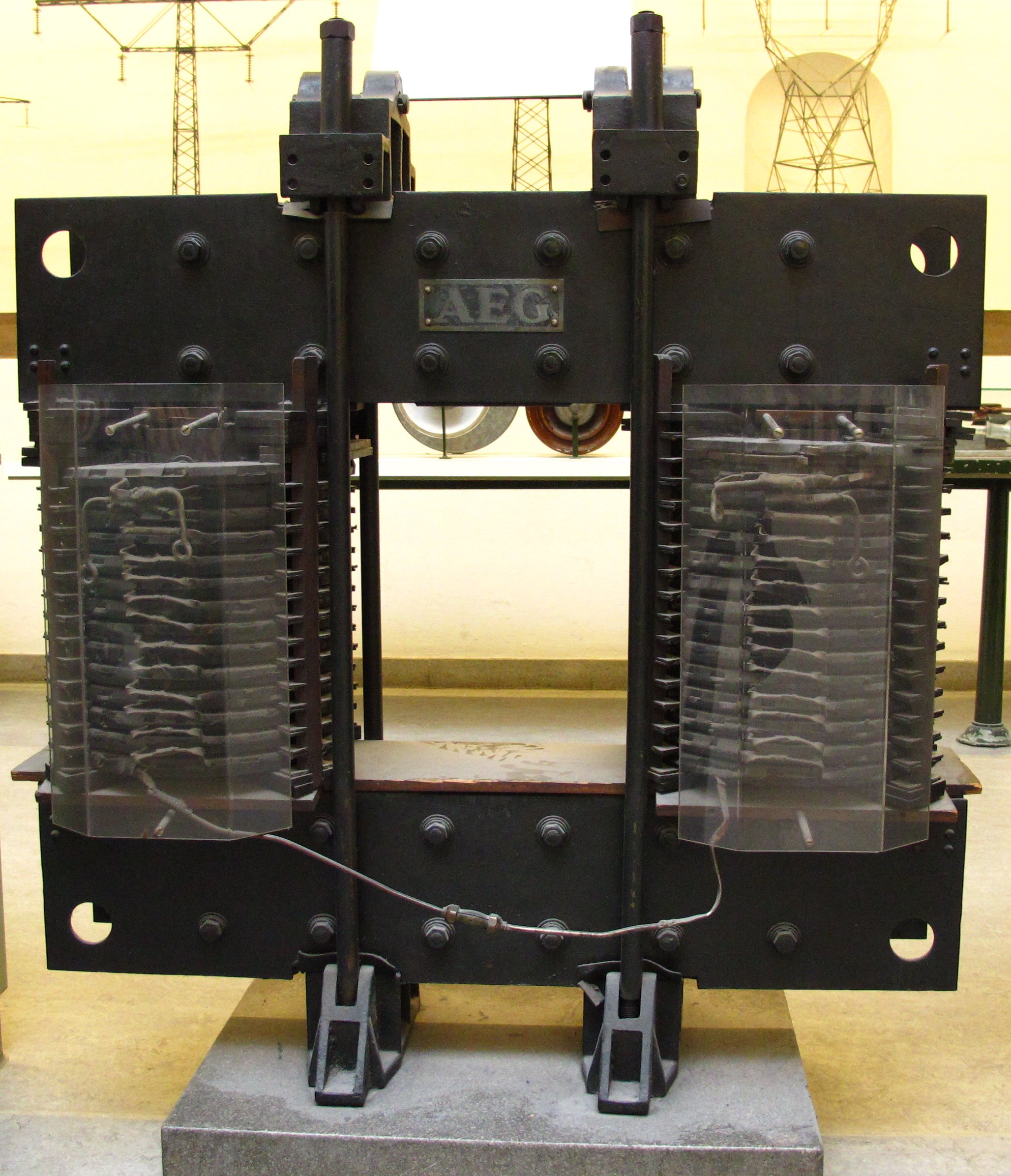 Erste Erdschlussspule von Petersen, 1917. Diese Spule zur Lichtbogenlöschung bei einpoligen Erdschlussfehlern an Freileitungen wurde 1917 behelfsmäßig von Waldemar Petersen in das 11-kV-Netz der Kraftwerke Altwürttemberg AG in Ludwigsburg eingebaut. Nach erfolgreichen Versuchsbetrieb war diese Spule bis 1928 zur Erdschlusskompensation von Strömen bis zu 40 A in Betrieb.